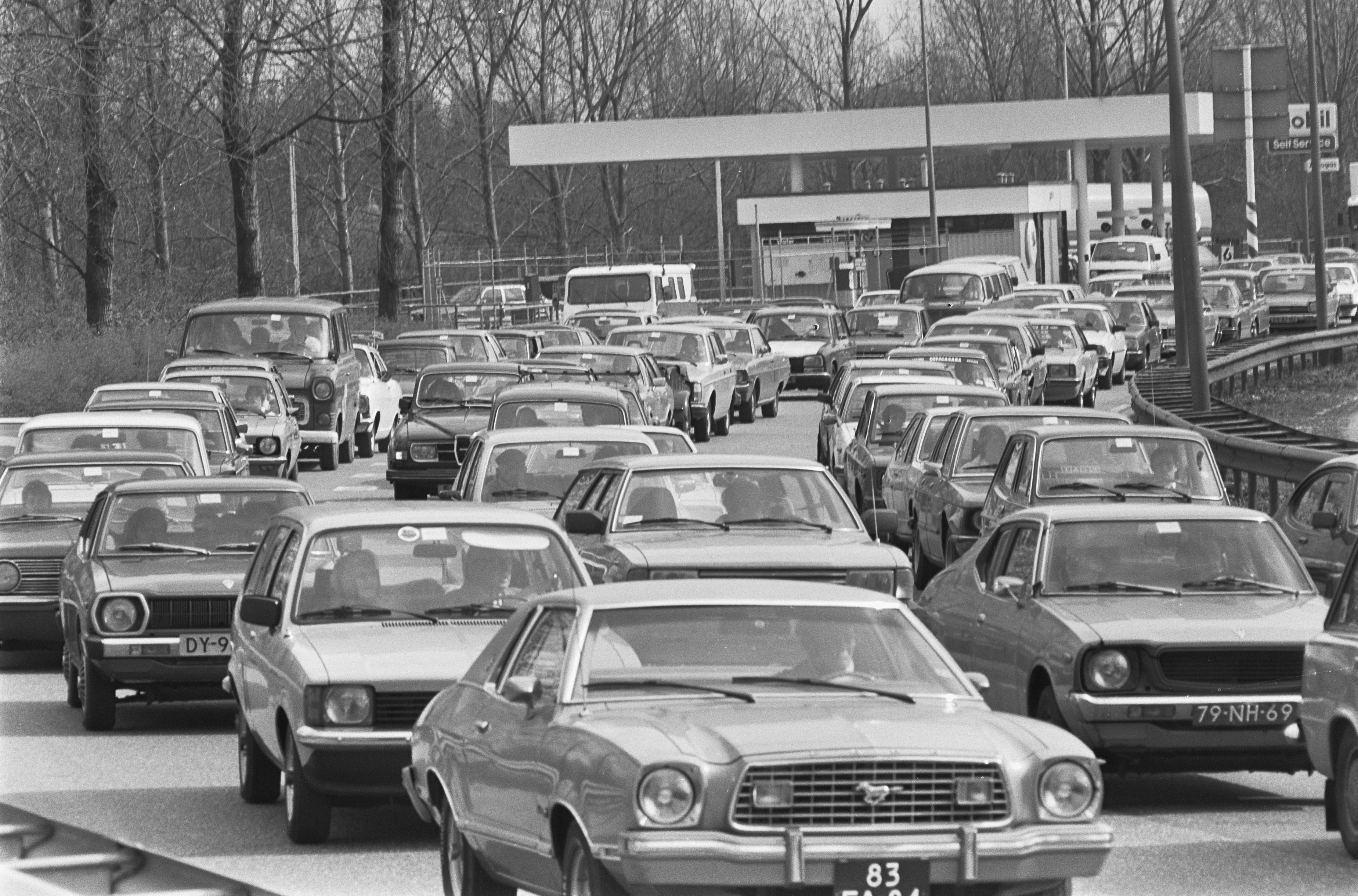 Collectie / Archief : Fotocollectie Anefo Reportage / Serie : [ onbekend ] Beschrijving : File op Gooiseweg (in verband met Paasdrukte) Datum : 9 april 1982 Trefwoorden : files Fotograaf : Smirren, […] van / Anefo Auteursrechthebbende : Nationaal Archief Materiaalsoort : Negatief (zwart/wit) Nummer archiefinventaris : bekijk toegang 2.24.01.05 Bestanddeelnummer : 932-0998